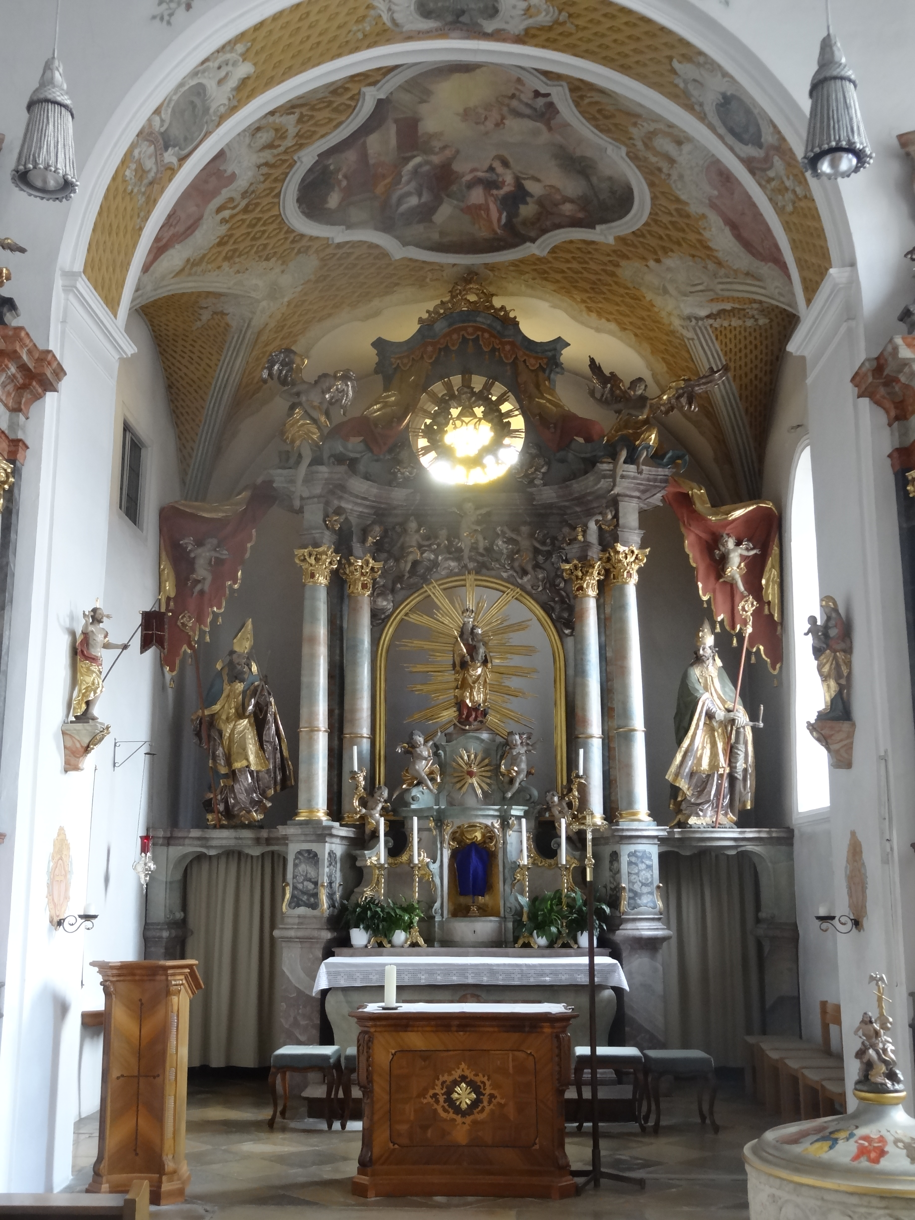 Chorraum der Pfarrkirche Mariä Heimsuchung in Ergolding